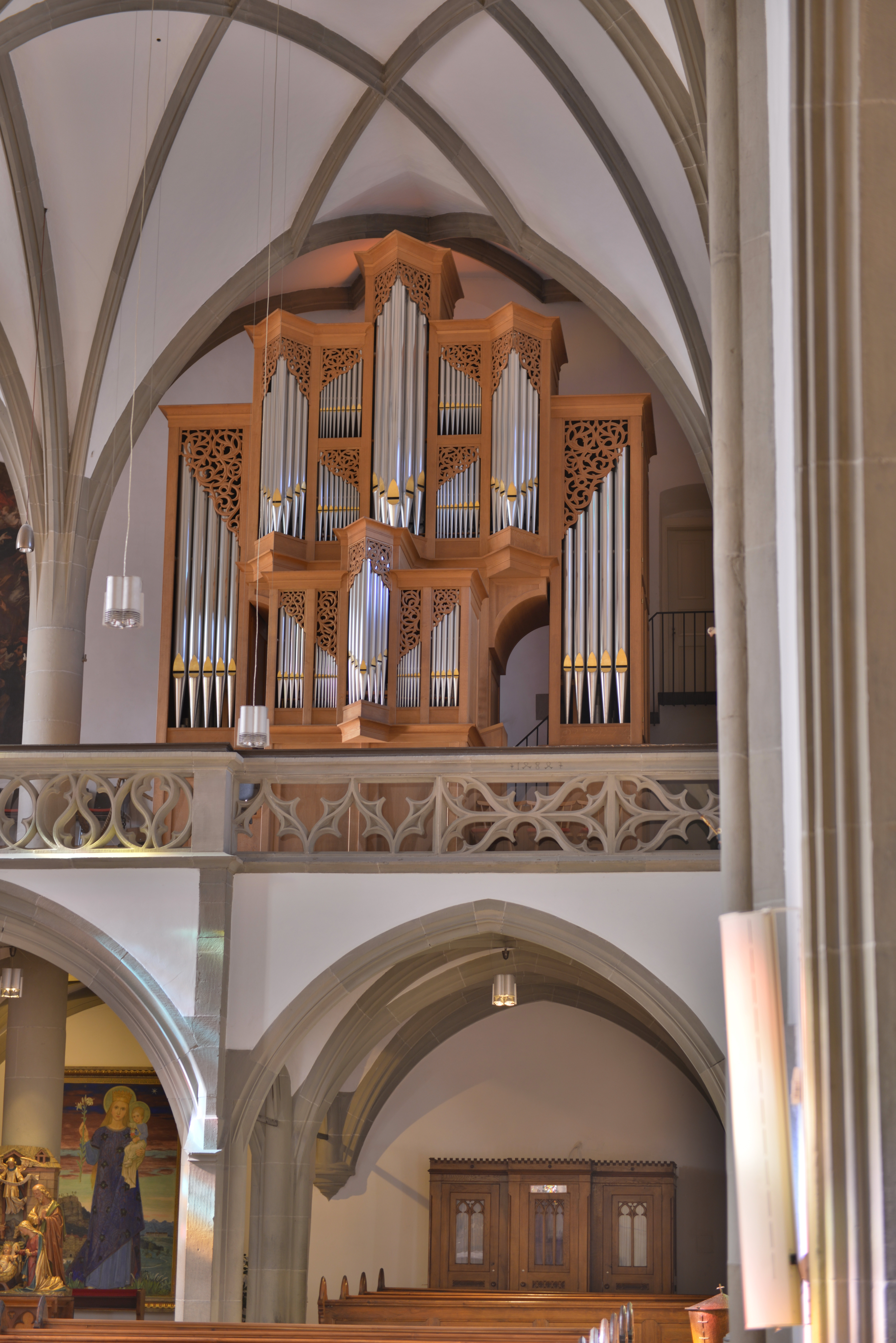 Dom St. Nikolaus (Feldkirch) am Domplatz Nr.2 in Feldkirch.